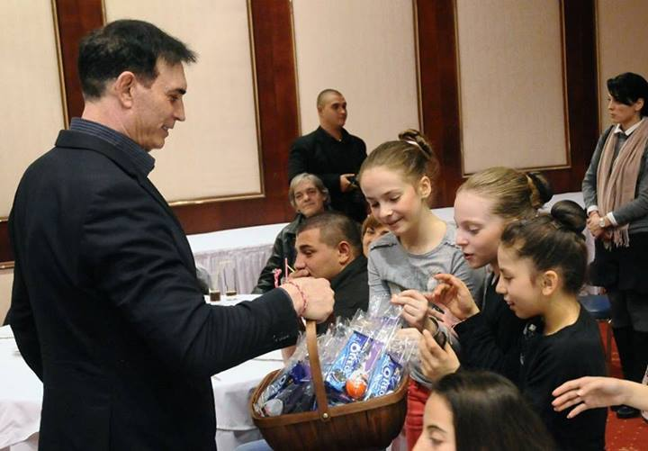 1март - Бал на многодетните семейства